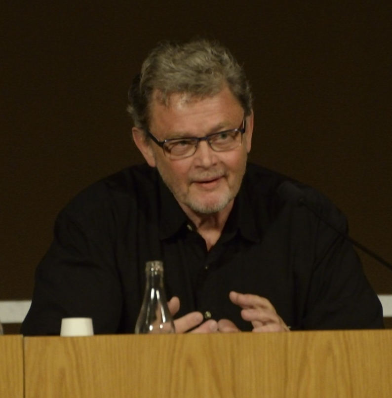 Birger Schlaug, 2015-04-18